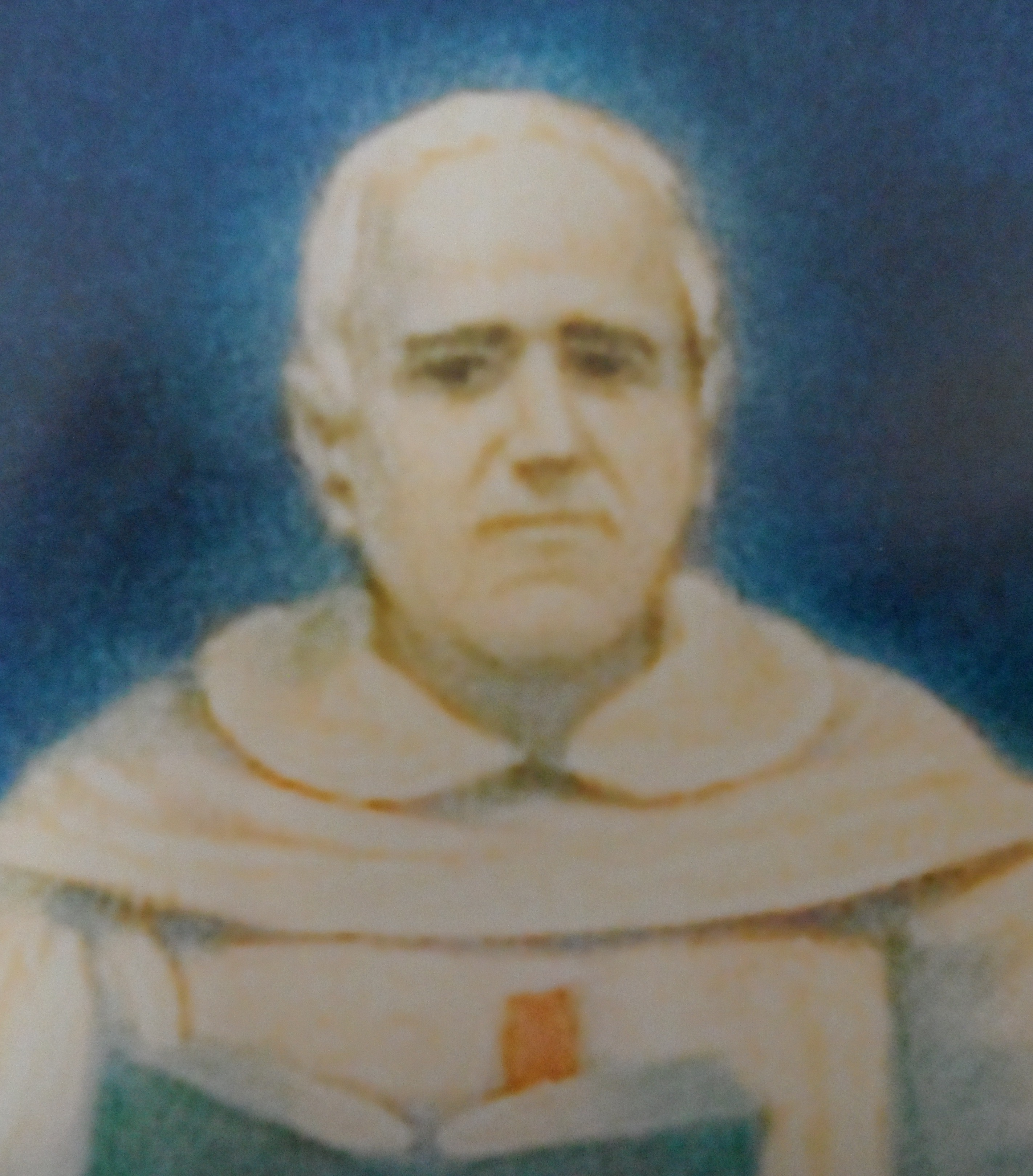 Particular del lienzo de Mariano de San José y Compañeros mártires trinitarios. Convento de San Carlino alle Quattro Fontane. Roma.